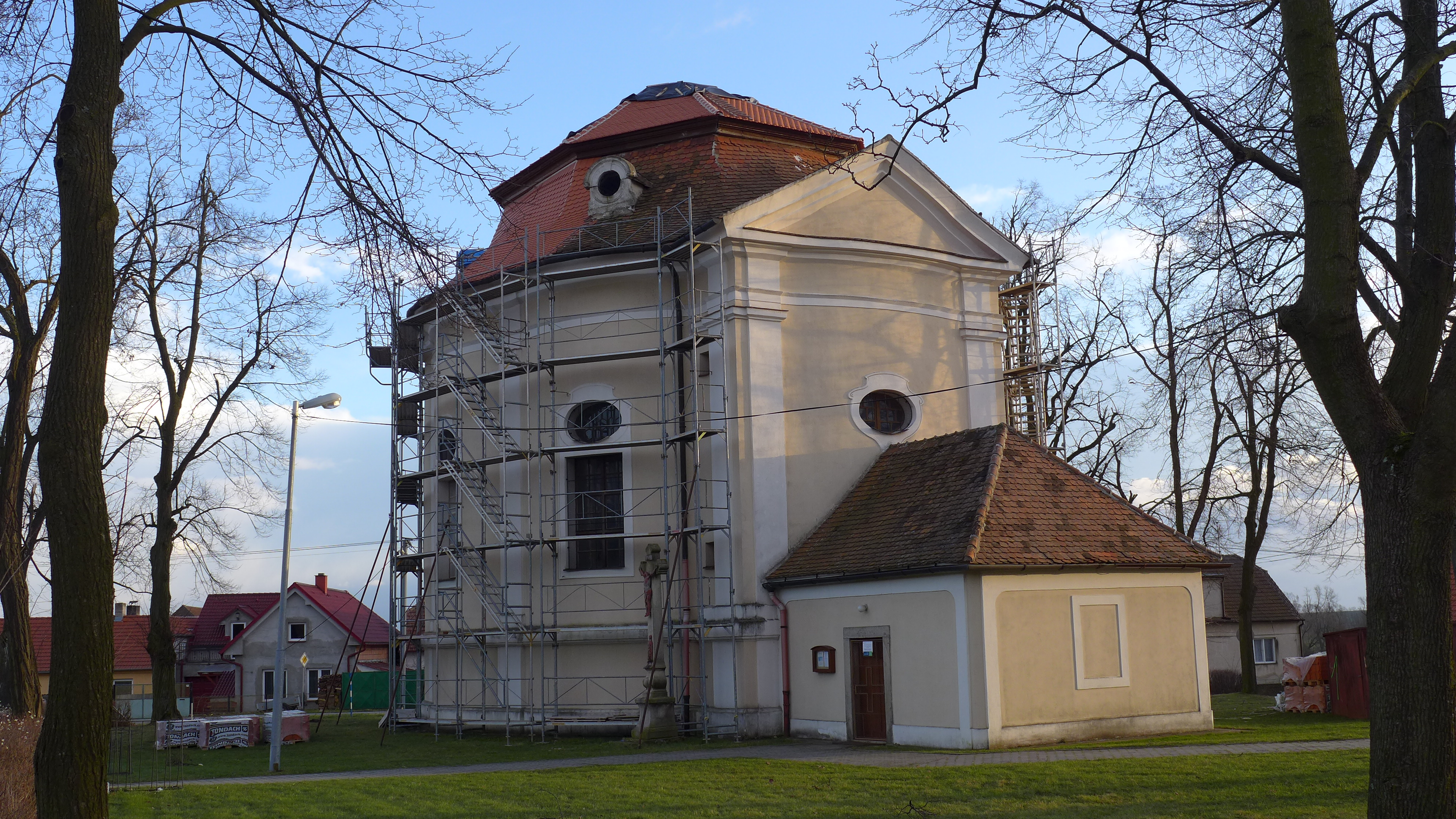 Kostel svatého Jana Nepomuckého, Litohoř.